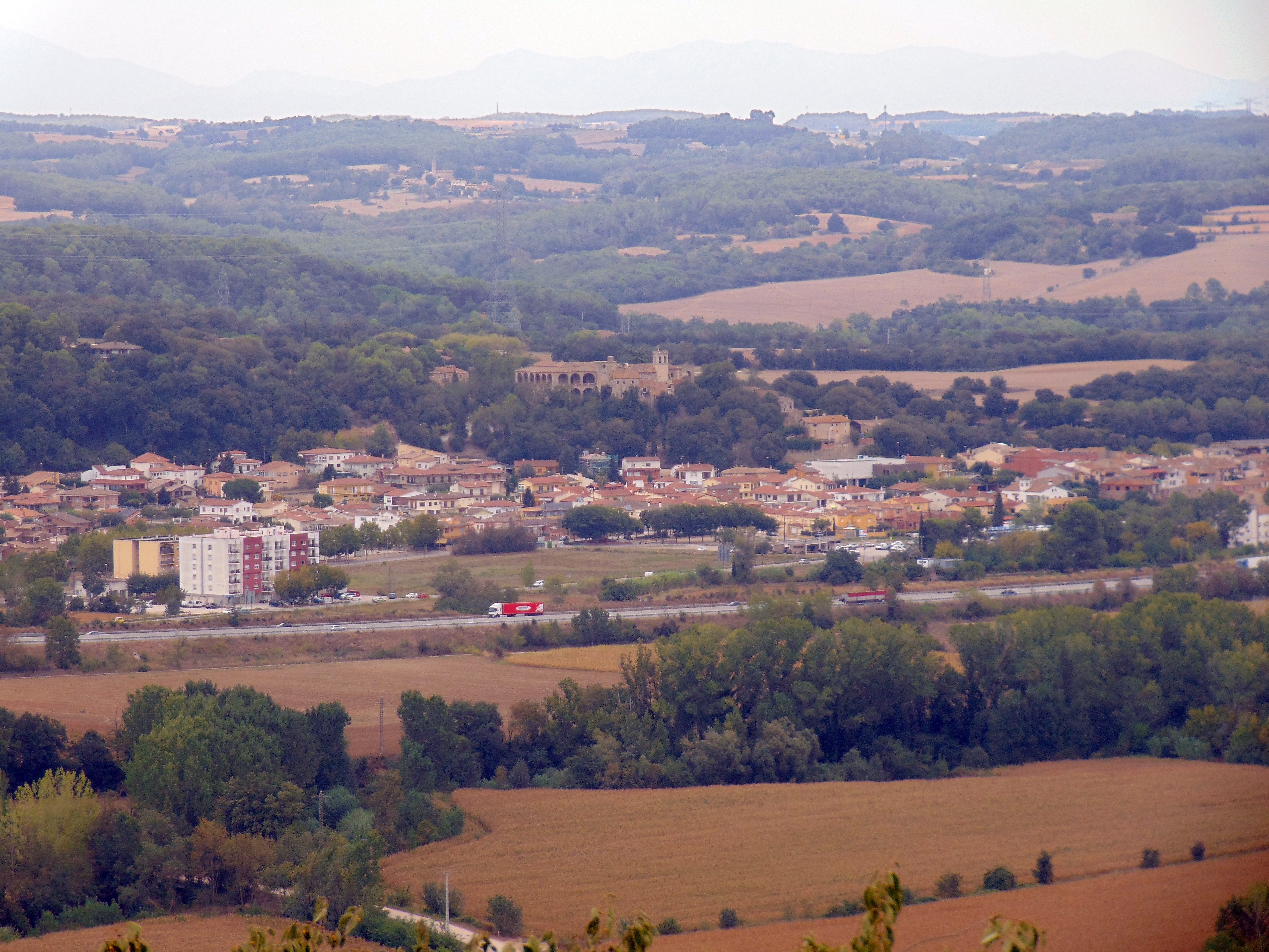 Nucli antic de Medinyà (Sant Julià de Ramis)